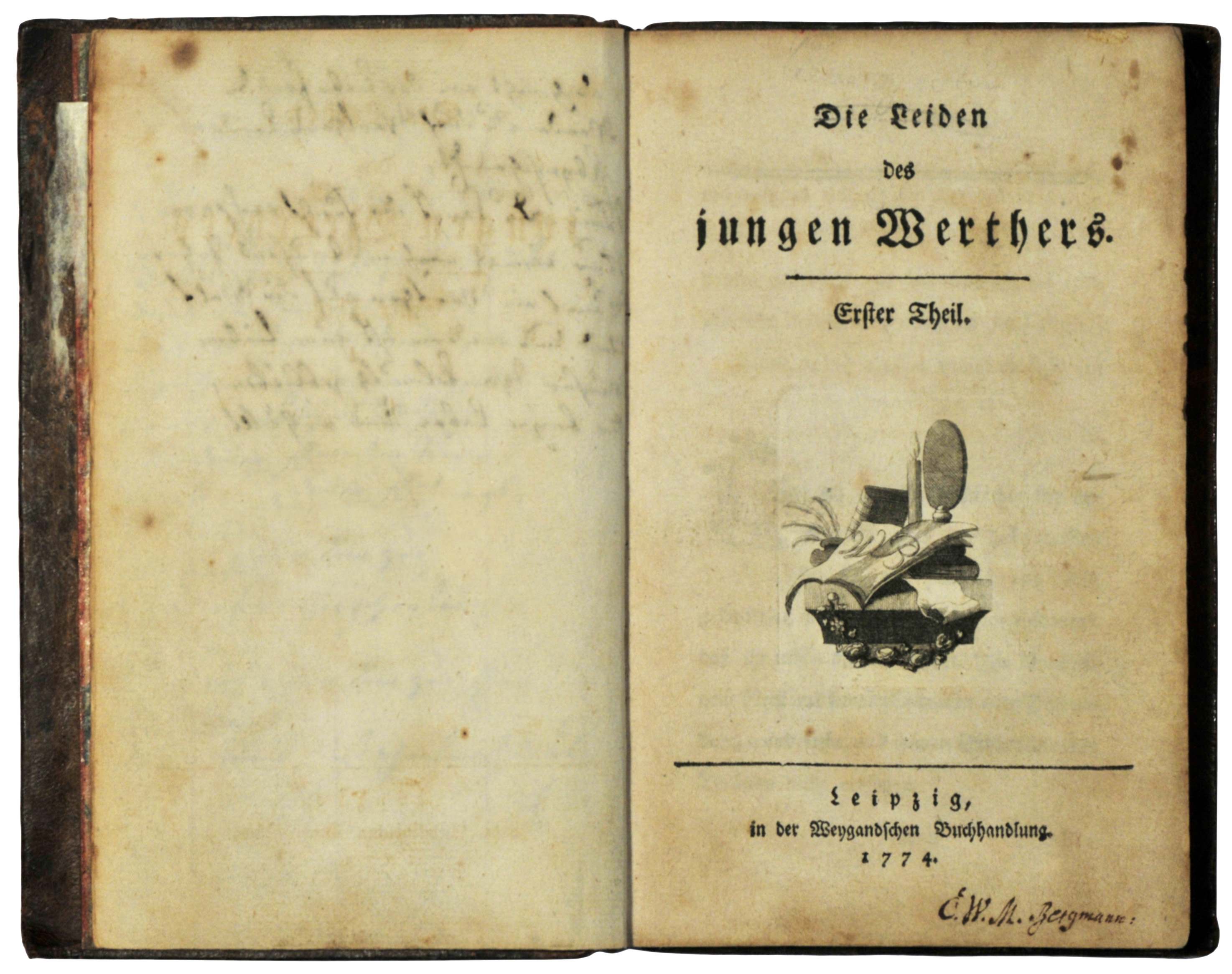 Goethe, Johann Wolfgang: Die Leiden des jungen Werthers. Erstausgabe 1774